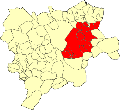 Arciprestazgo de Chinchilla= Extensión de las parroquias que componen el Arciprestazgo de Chinchilla, en la Diócesis de Albacete (España)